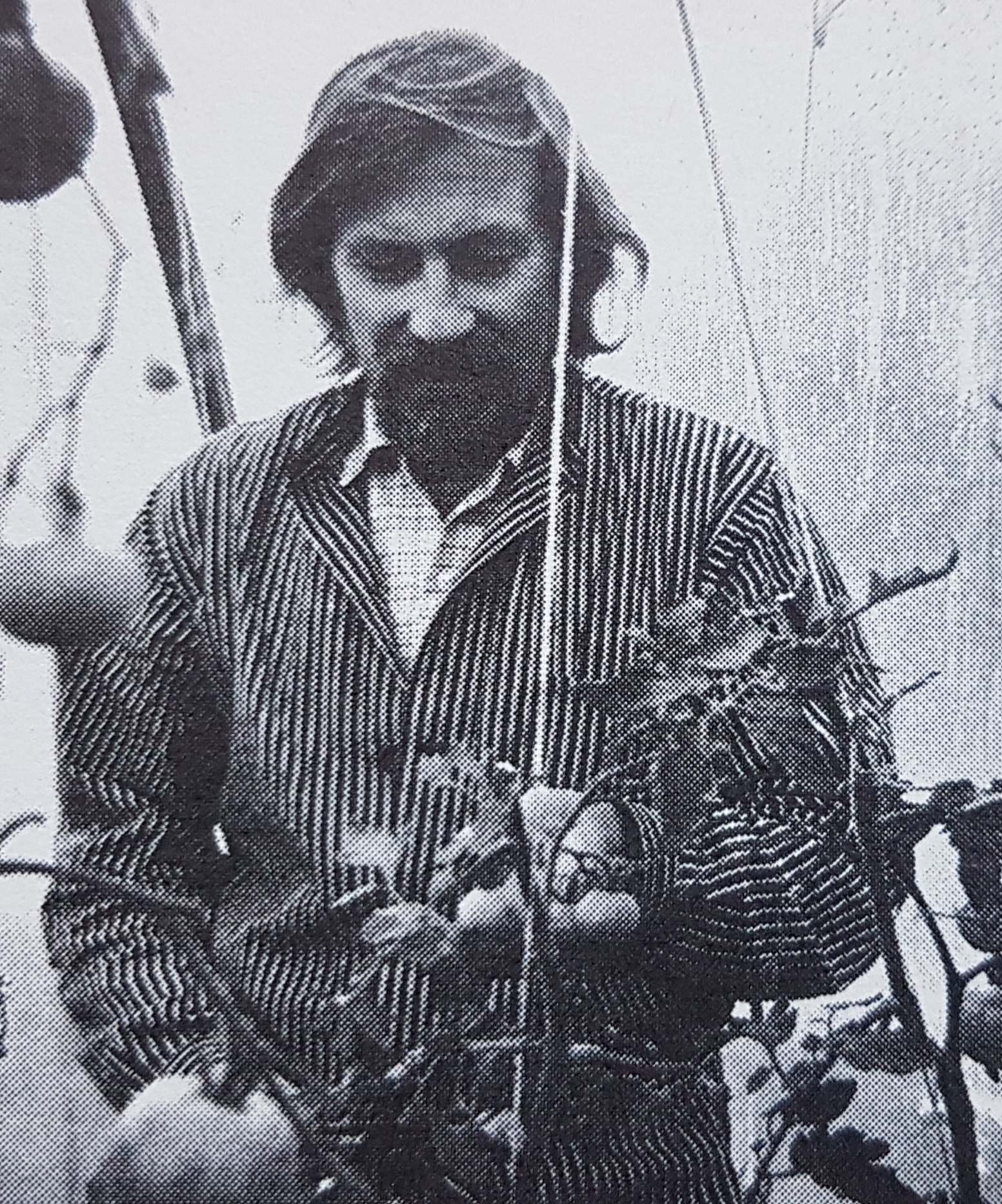 Harry Moberg Artist.from Sweden